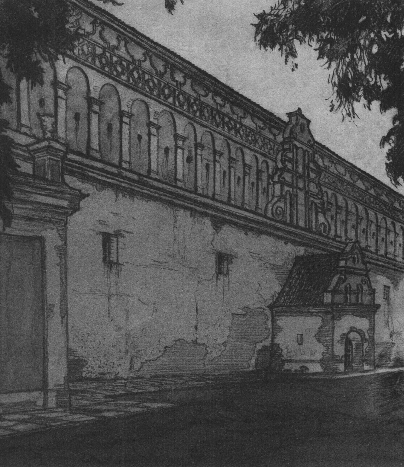 Георгій Лукомський. Заслав. Стіна Бернардинського монастиря. 1910